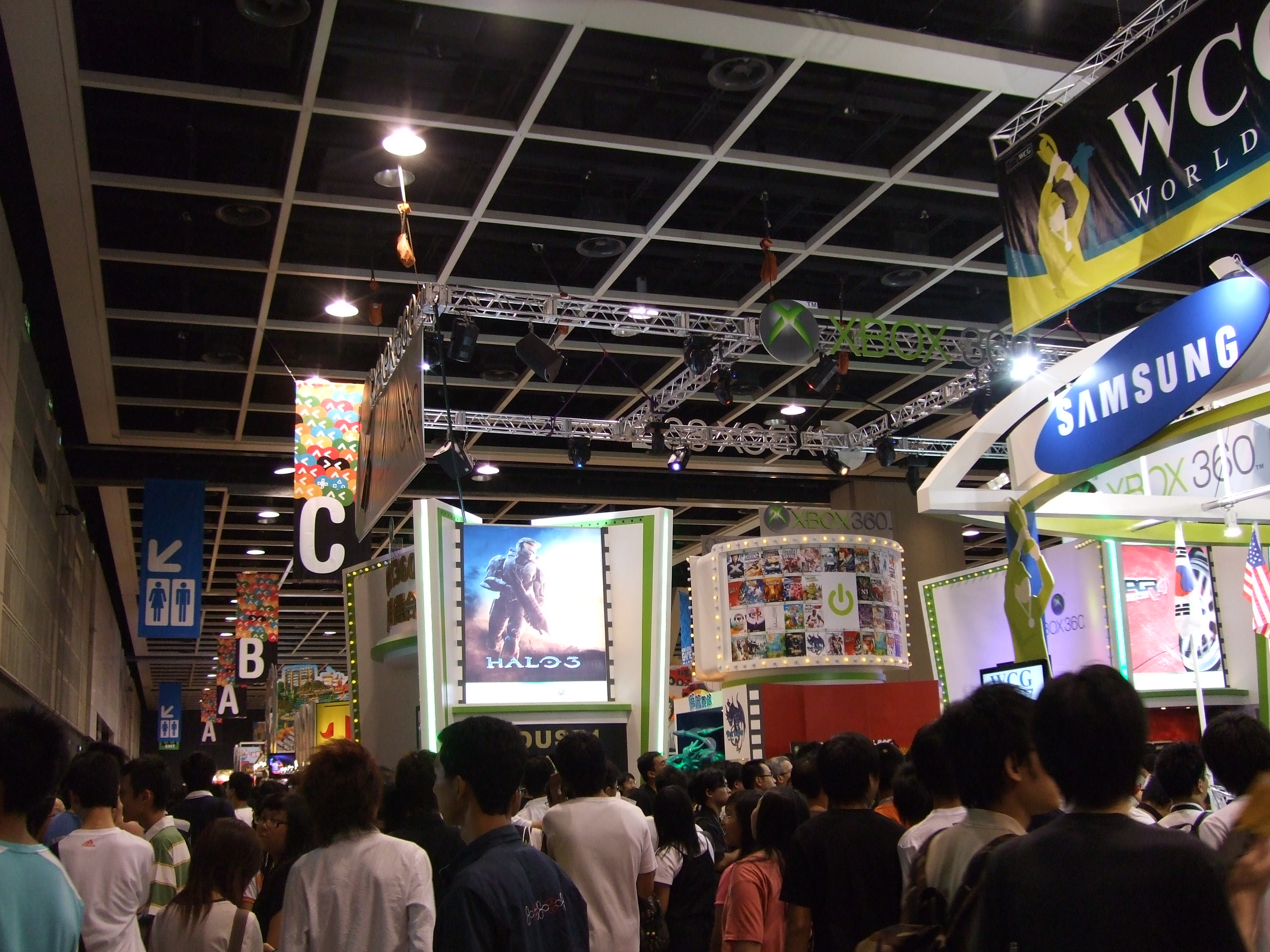 中文（香港）: 2007年香港動漫節。